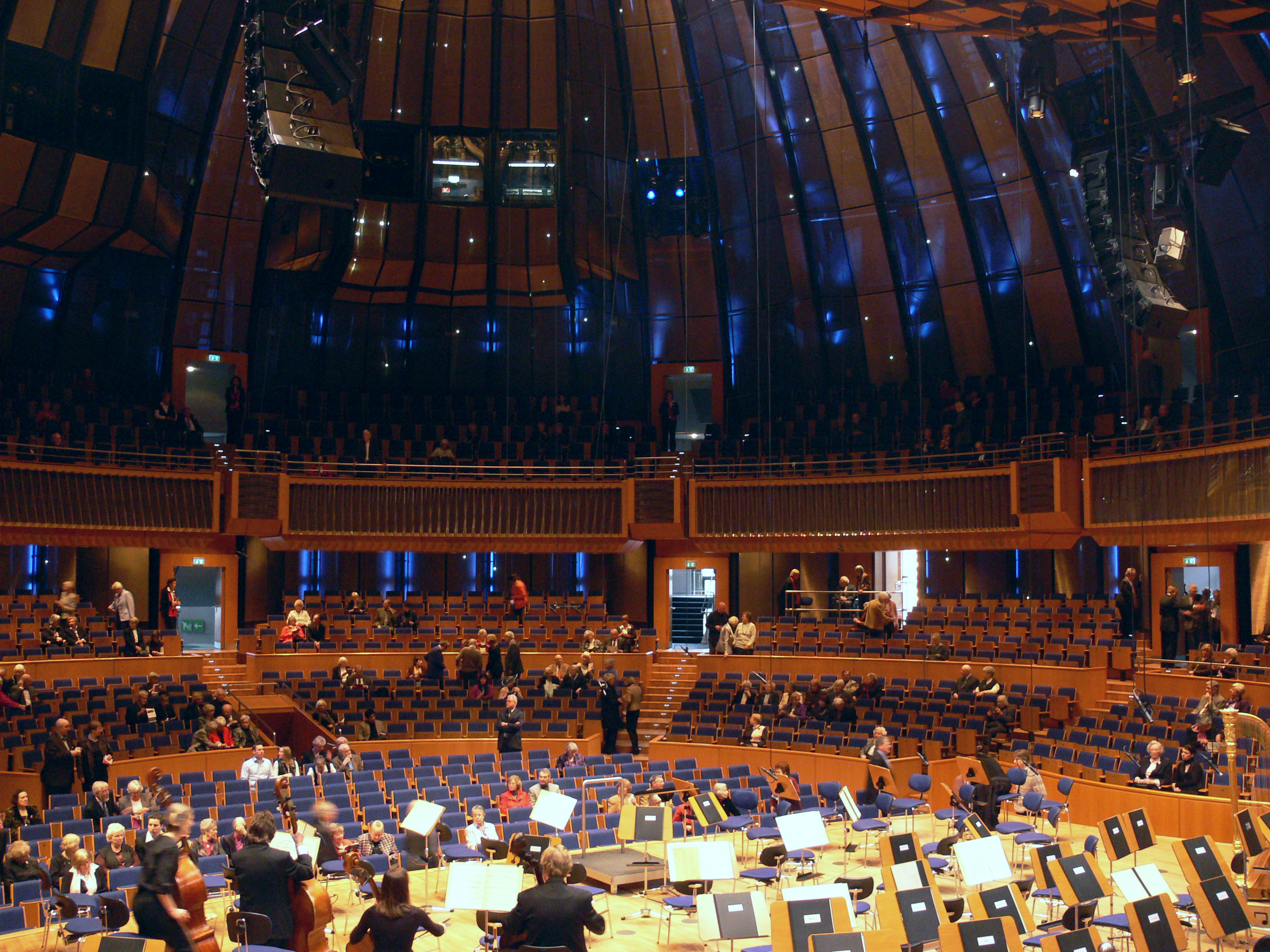 Düsseldorf, Tonhalle Großer Saal